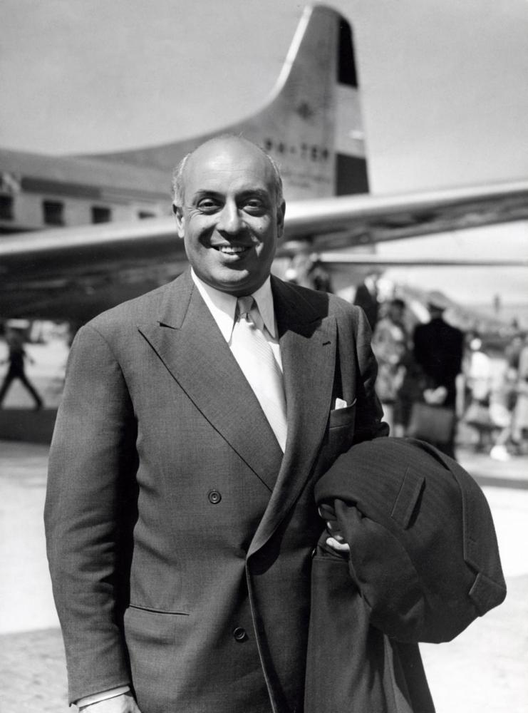 Ray Ventura (1908-1979). Chef d'orchestre, compositeur et acteur français le 12 août 1950 à son arrivée à l'aéroport national des Pays-Bas.